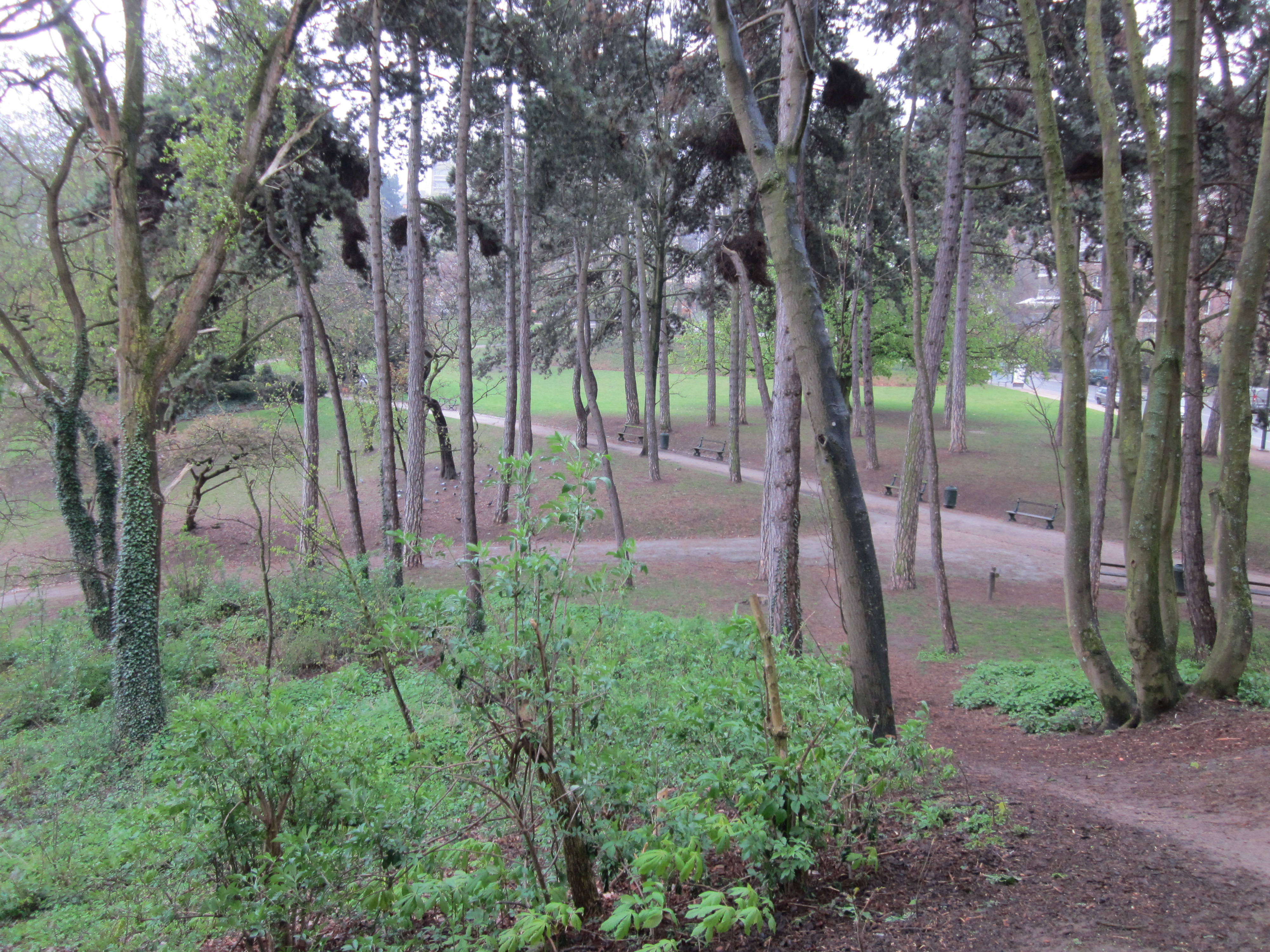 Les pins qui portent de nombreux nids de perruches au parc de Forest (Bruxelles)